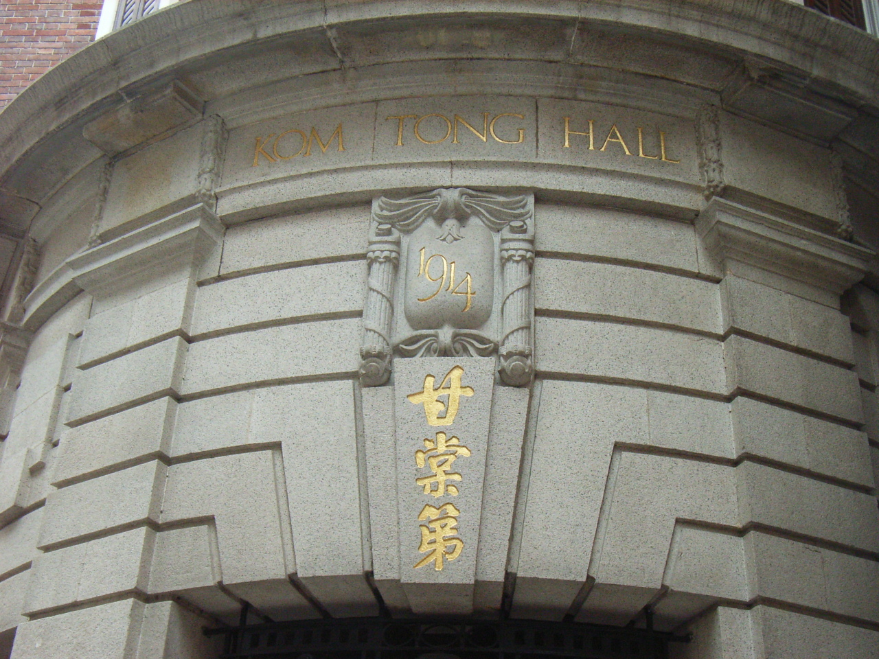 Dr. Sun Yat-sen Museum (Traditional